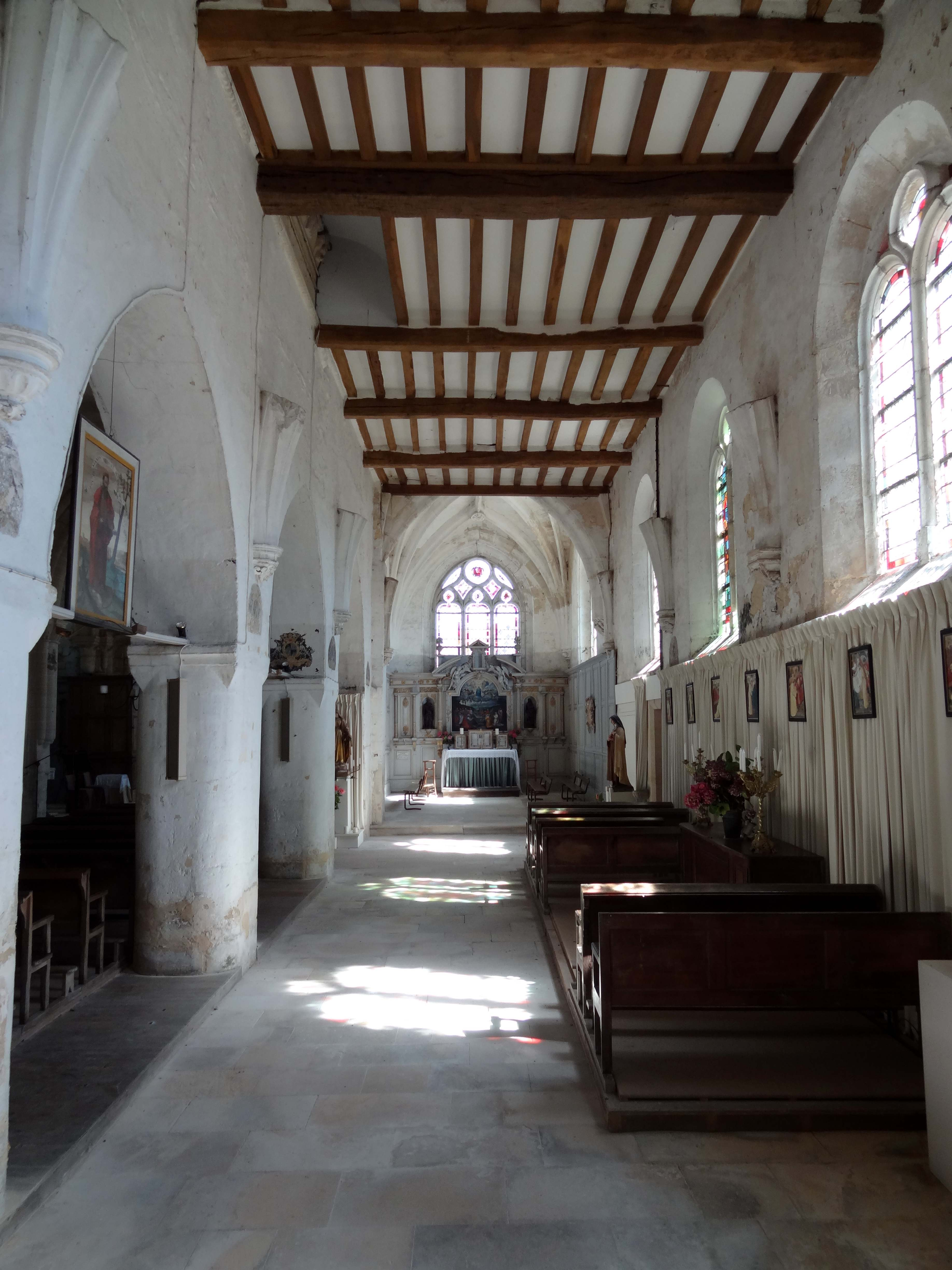 Intérieur de l'église - voir titre.